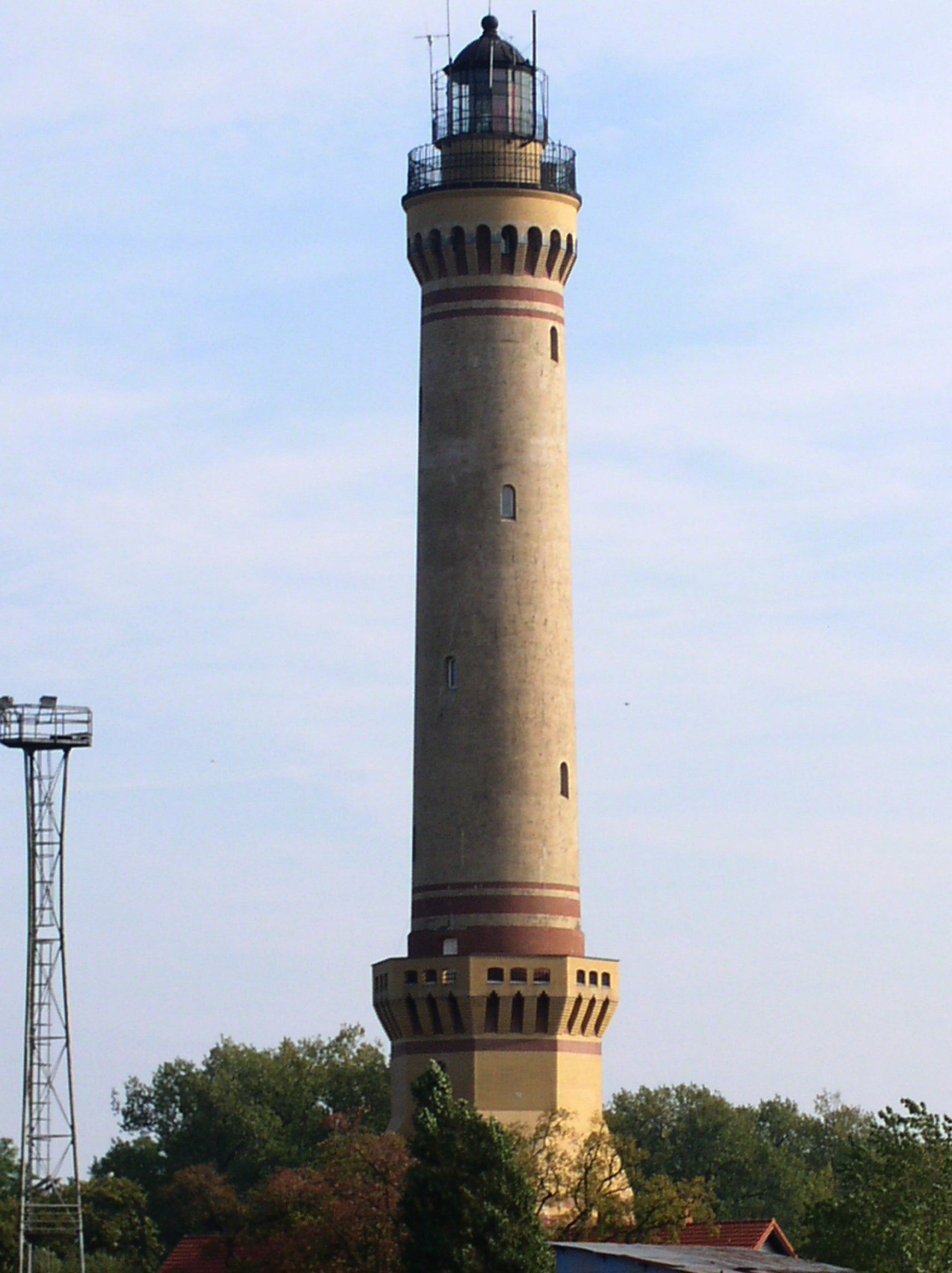 latarnia w Świnoujściu